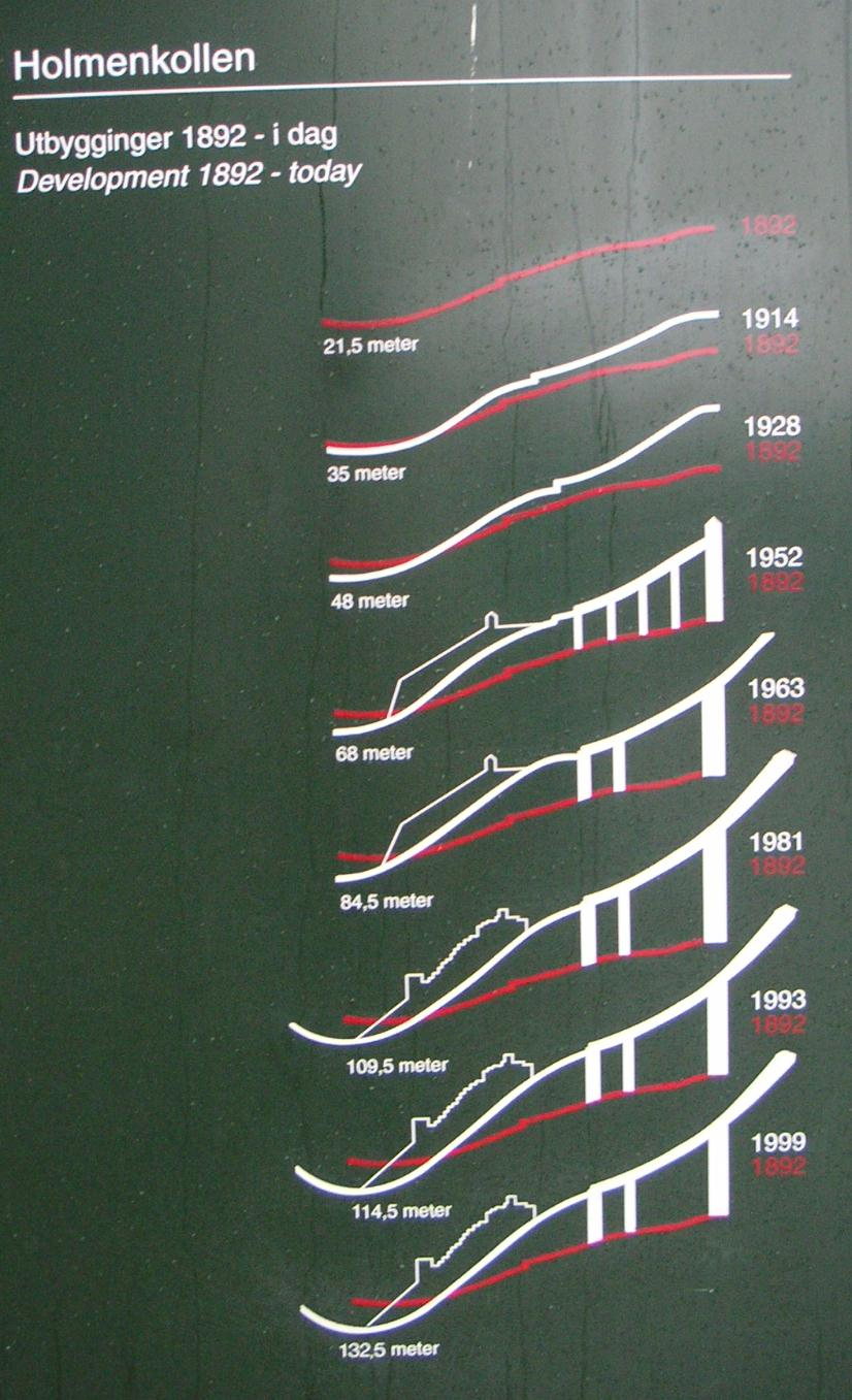 Entwicklung der Schanze am Holmenkollen